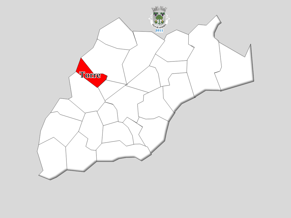 Censo 2011